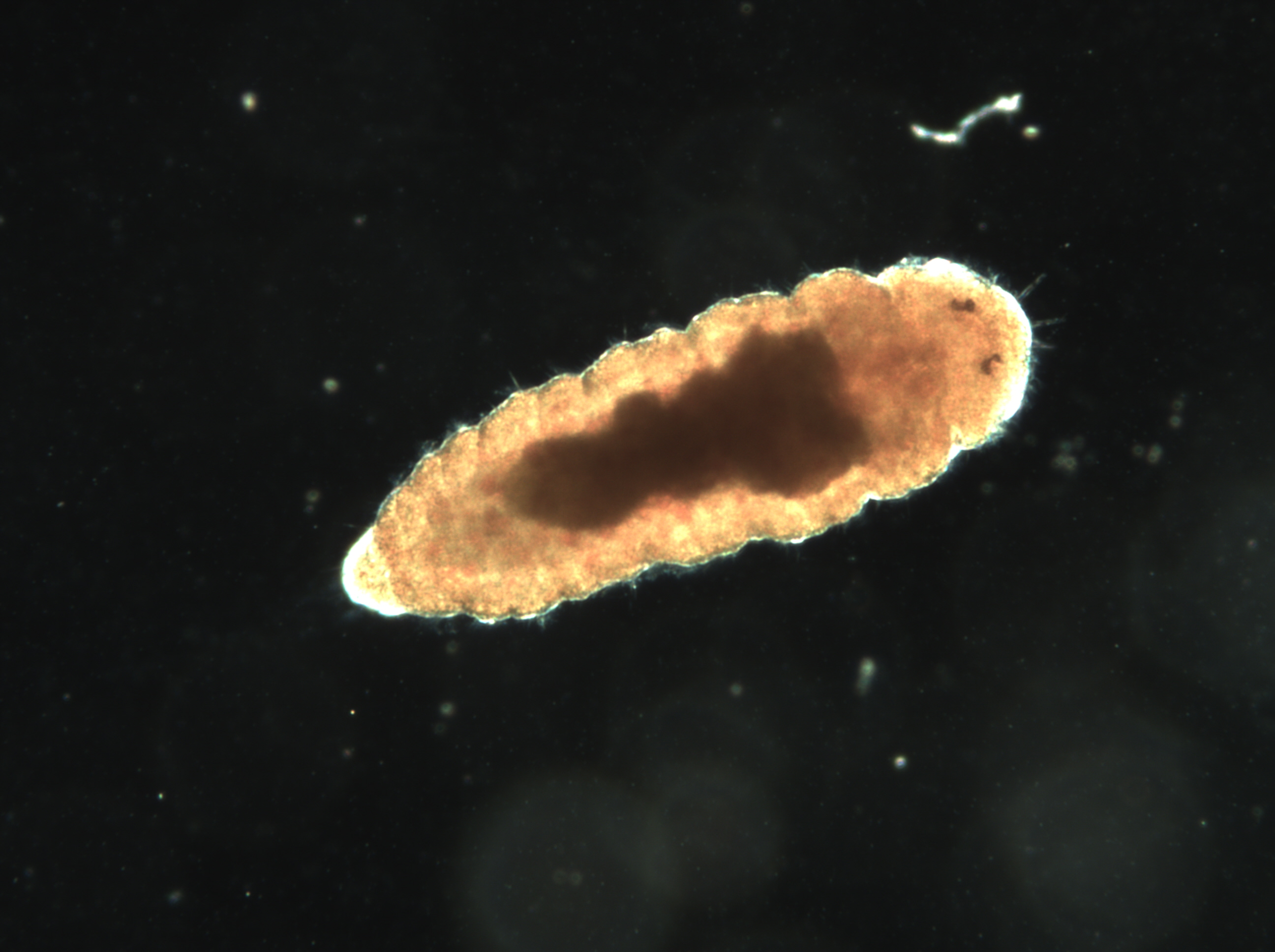 Bild af Dinophilus taeniatus indsamet i Öresund